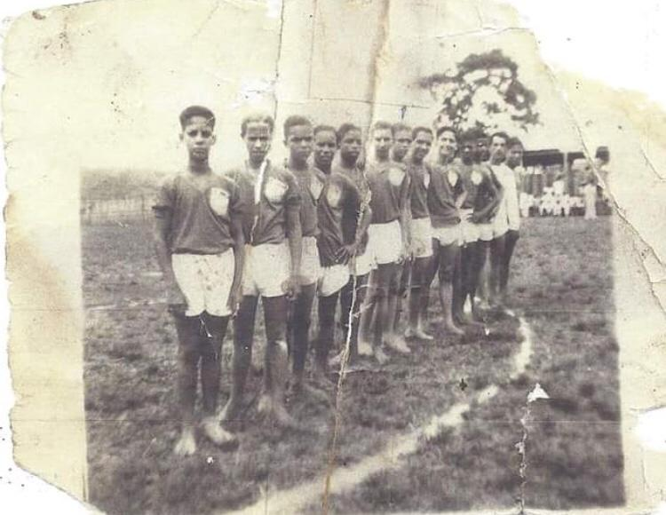 FLORESTA